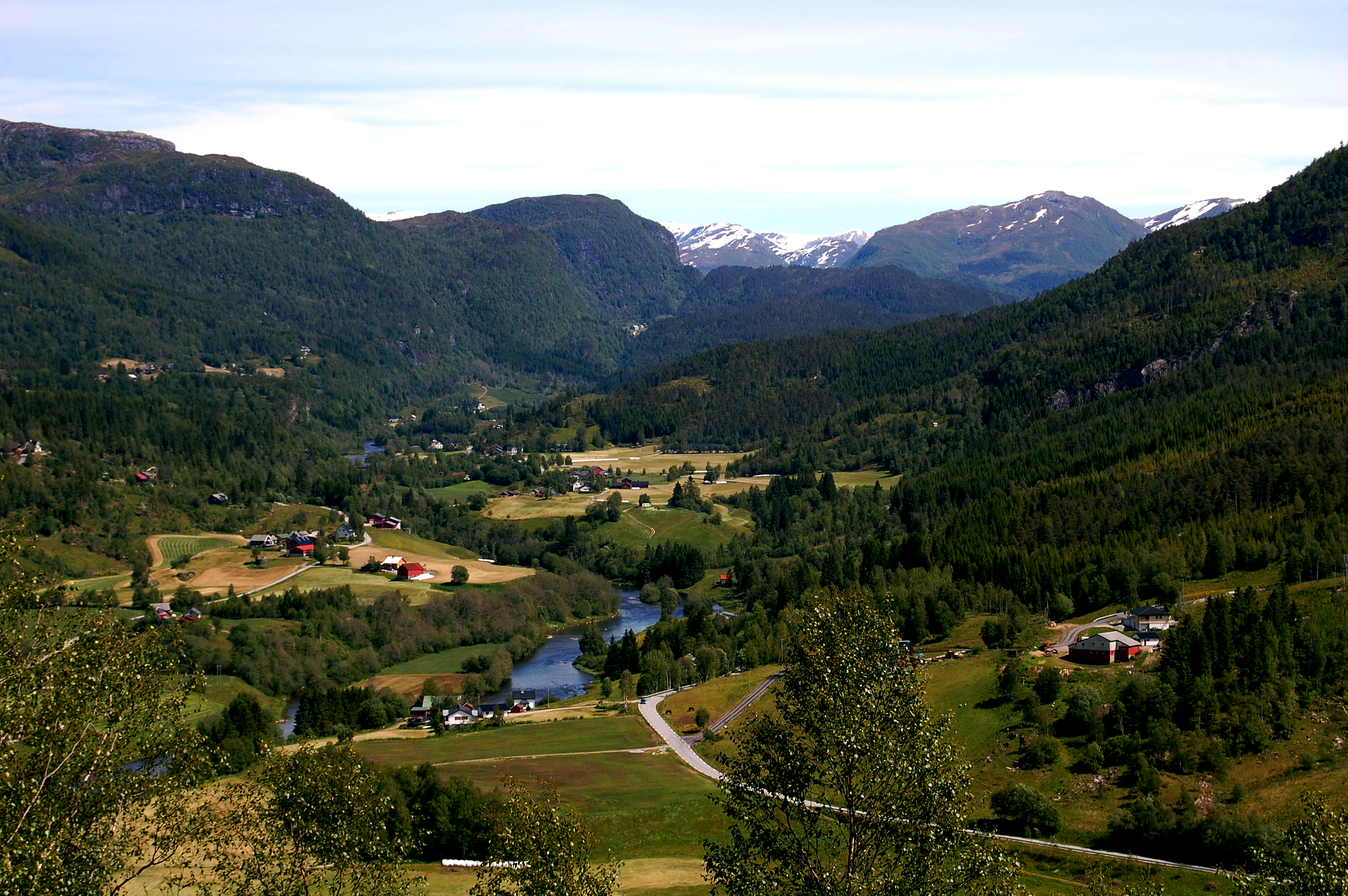 I Naustdal kommune. Elva er Nausta